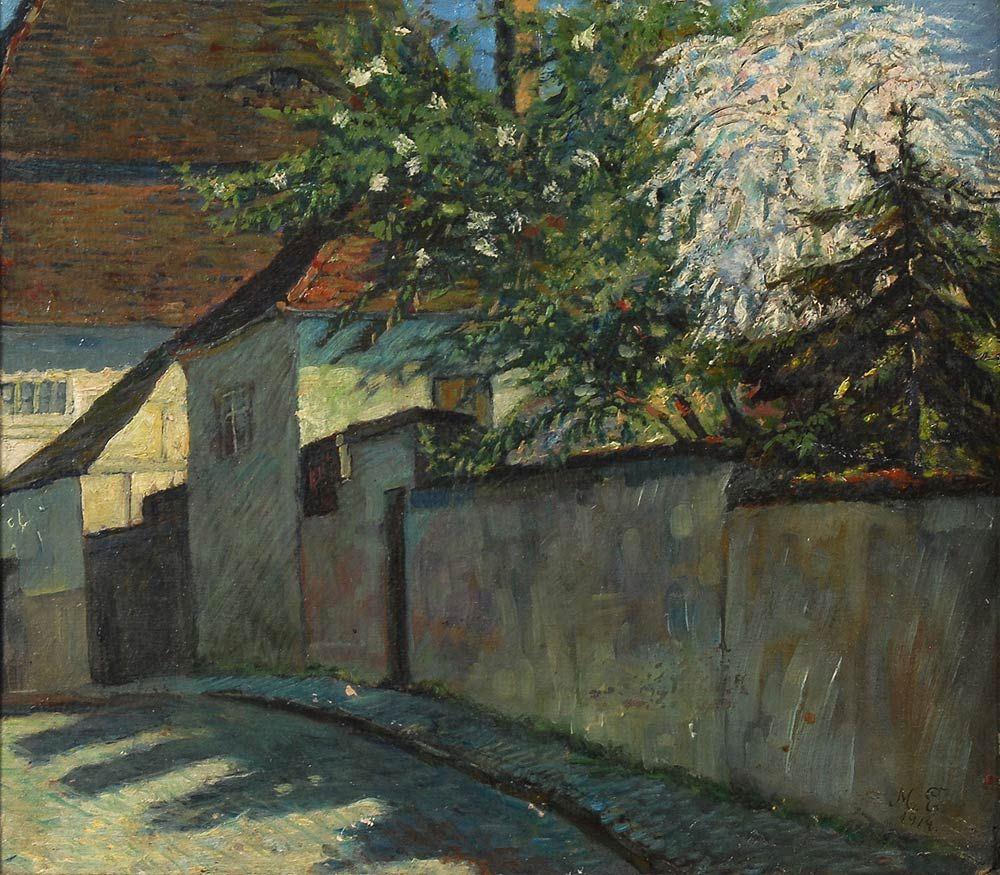 „Dorfstraße mit blühenden Bäumen in Alassio “ Öl auf Malkarton 32 x 36 cm (o. R.) r. u. monogrammiert/datiert: „M. E. 1914.“ Entstehung Juni 1914 in Alassio (Italien)